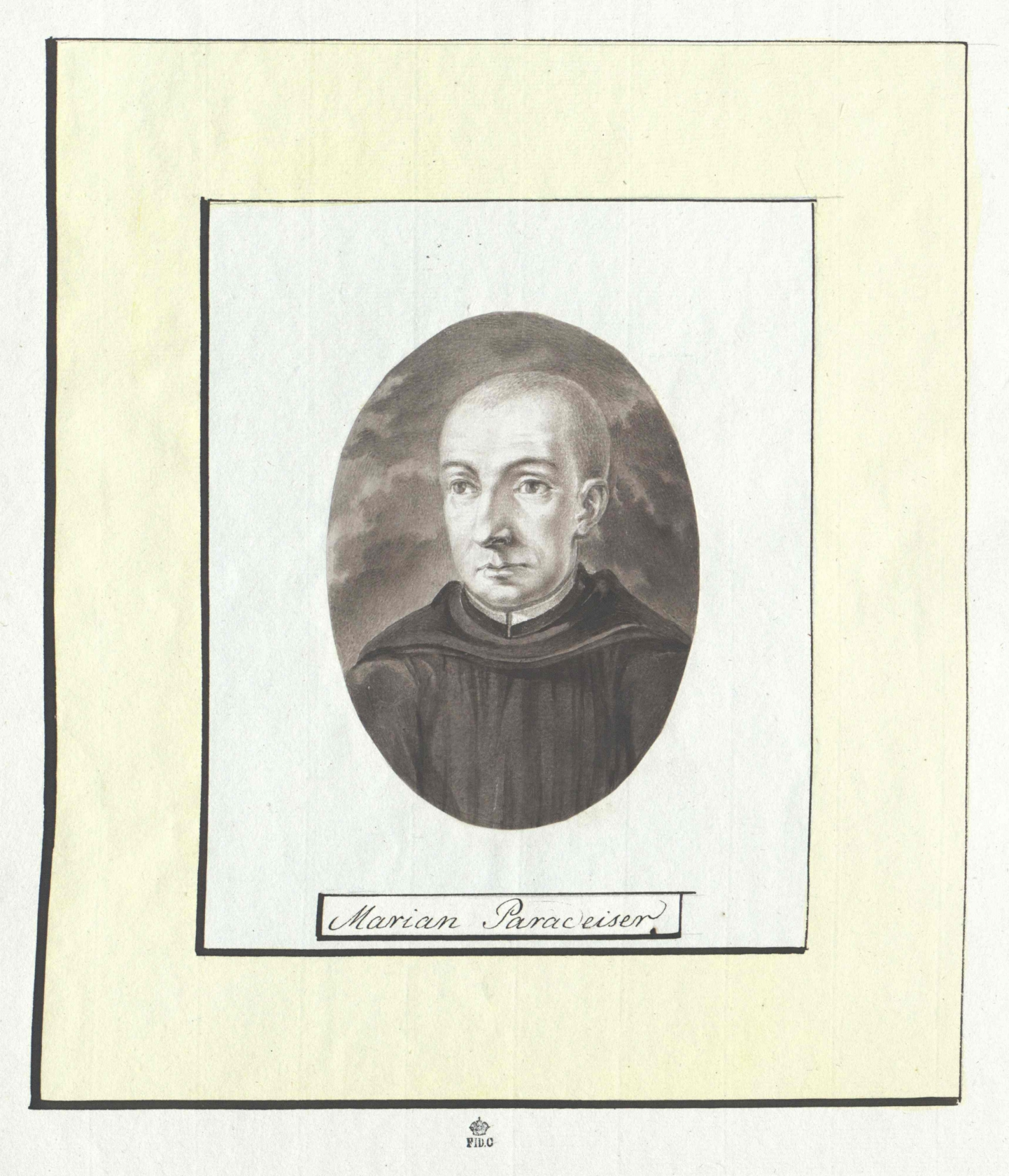 Zeichnung des niederösterreichischen Komponisten Marian Paradeiser (1747-1775)